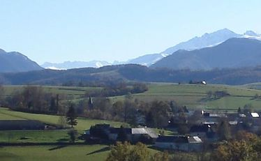 Le village de Loucrup vu de la route de Layrisse